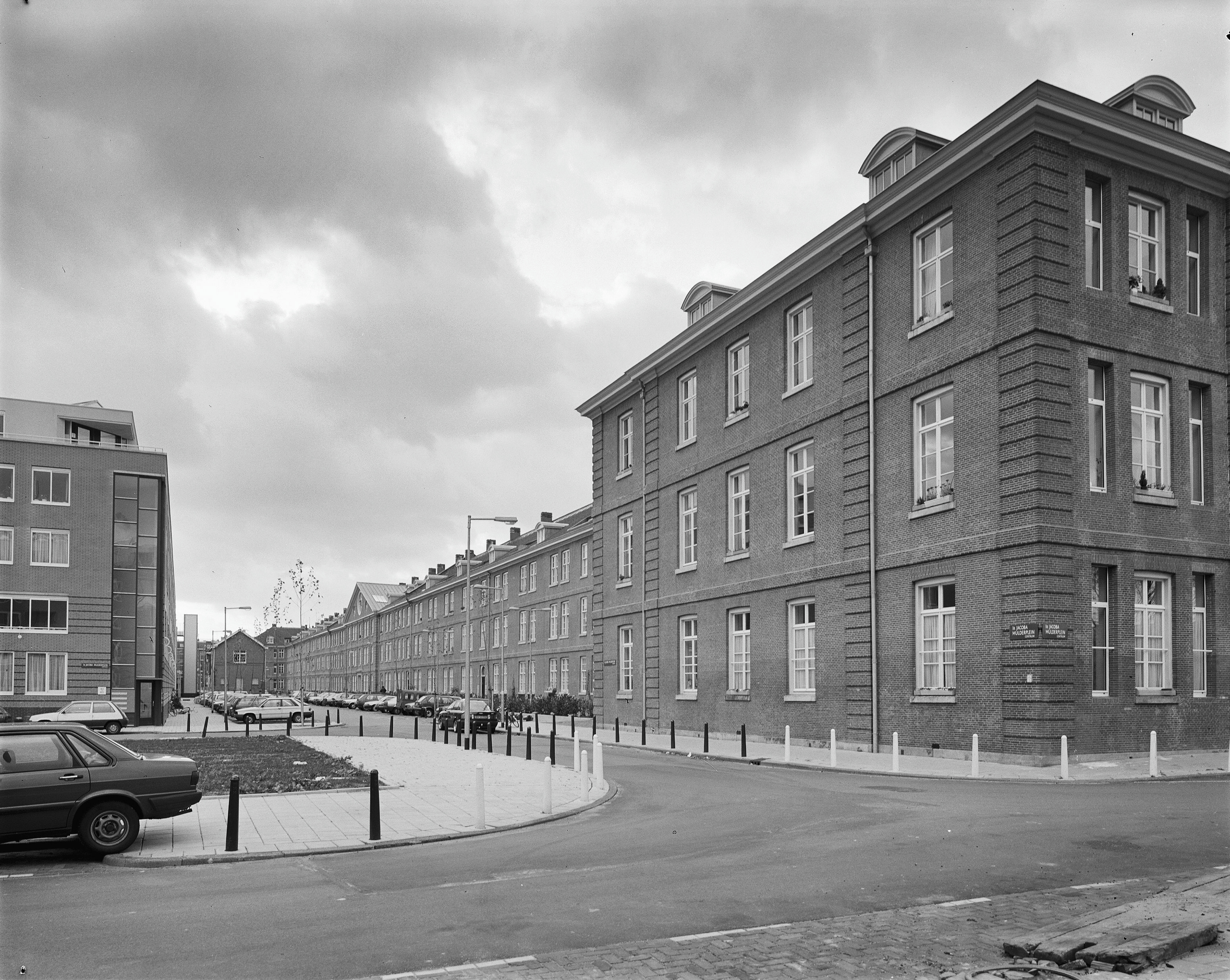 Vm. Oranje-Nassaukazerne: achtergevel. Links ligt sinds 1990 het Ir. Jakoba Mulderplein. Ook de bebouwing rechts, een zijvleugel van de voormalige kazerne, wordt nu tot dit plein gerekend. Op de achtergrond in het midden loopt de Louise Wentstraat.